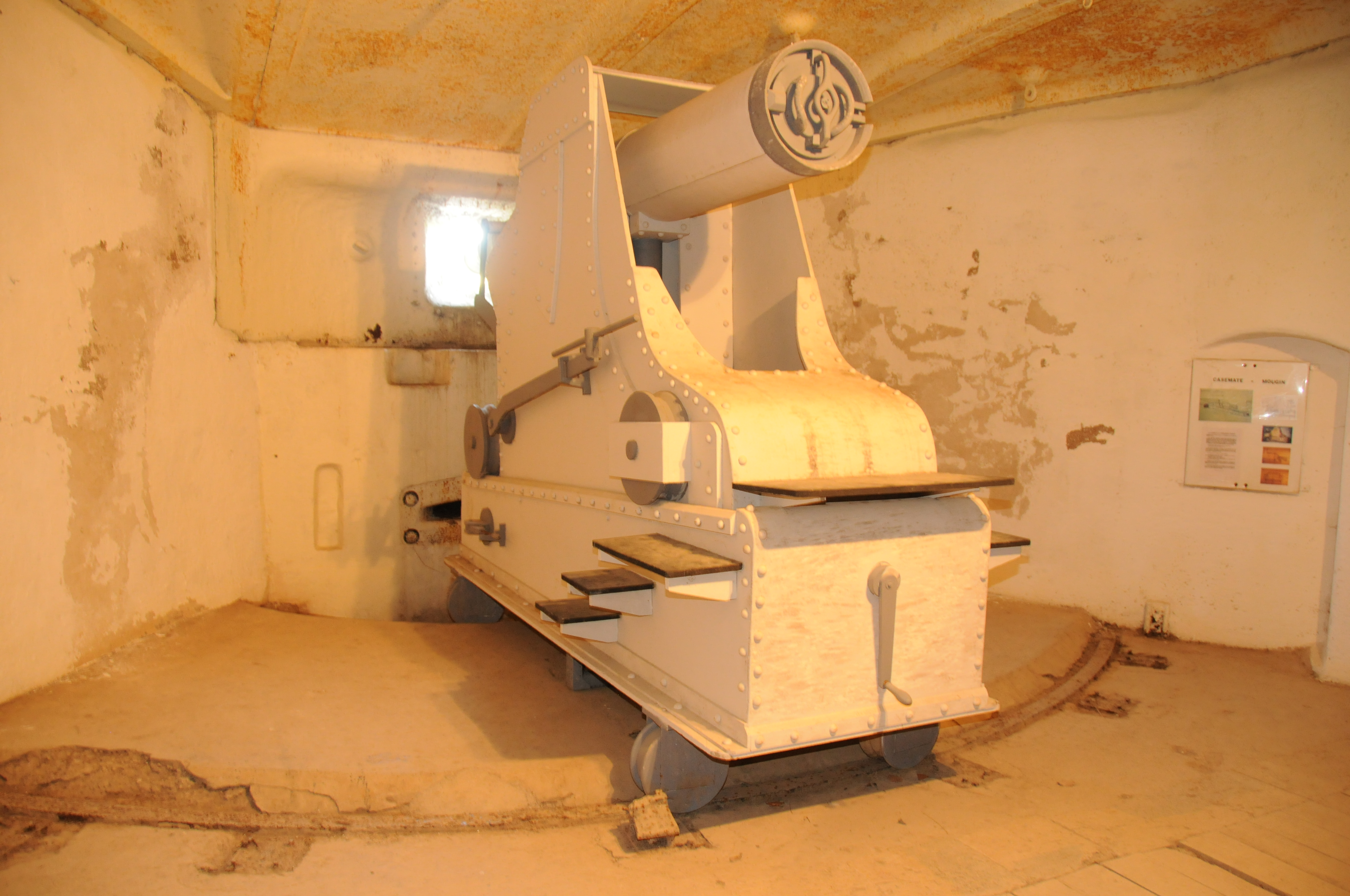 Casemate Mougin avec une maquette du canon d'origine. Bart hill fortifications